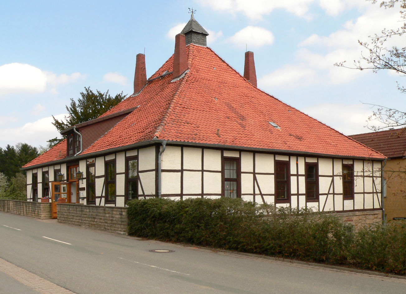 Hüttengebäude der Glashütte Klein Süntel, um 1820 zum Herrenhaus umngebaut